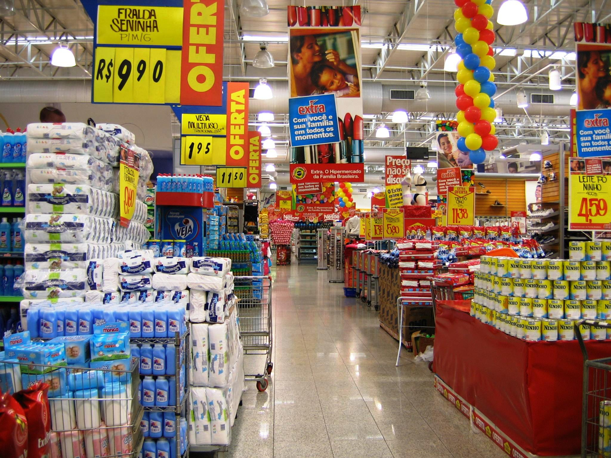 Interior de um supermercado